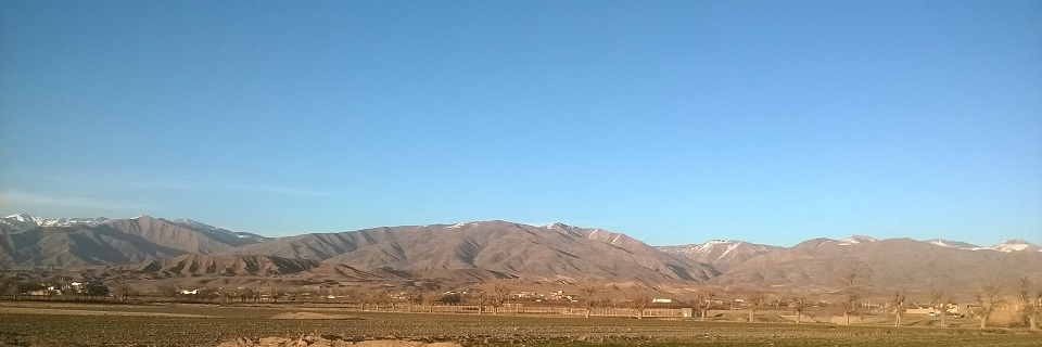 نمایی از رشته‌کوه بینالود از فاصله تقریبی هفت کیلومتری- خیابان امام‌زاده روستای حاجی‌آباد زبرخان - 1 بهمن 1394 - عکاس: محمد محمدی